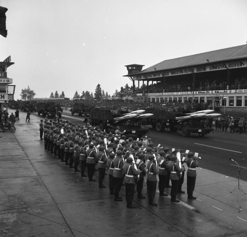 20 Jahre NATO. Bundeswehrparade auf dem Nürburgring